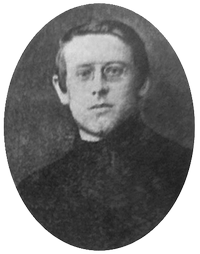 С. Петлюра. Полтава 1902 р.